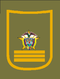 Insignia de IT PONAL COLOMBIA